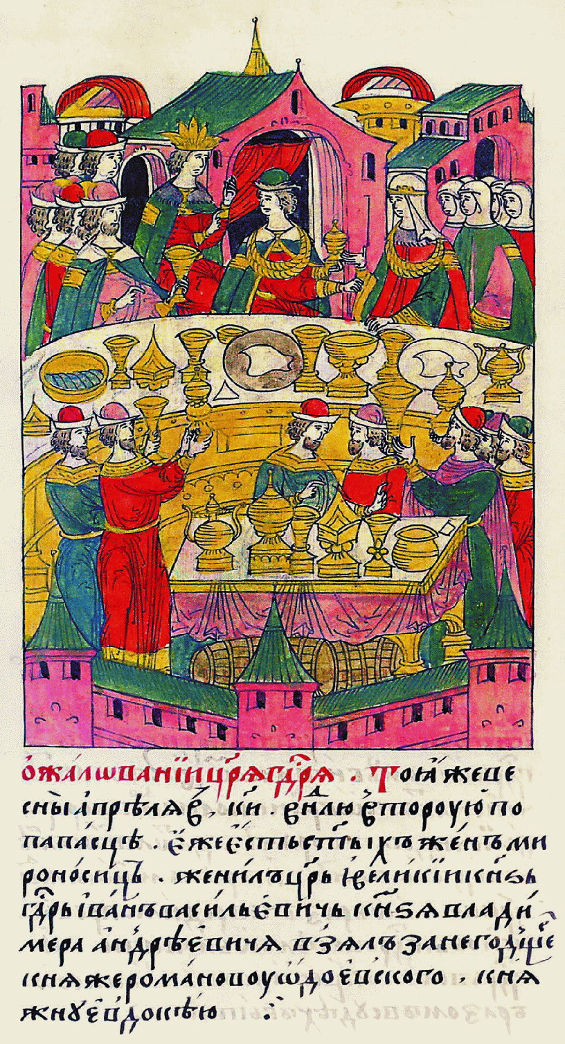 О жаловании царя и государя. Той же весной в апреле в 28 день, в неделю вторую после Пасхи святых Жен Мироносиц, женил царь и великий князь государь Иван Васильевич князя Владимира Андреевича, взял за него дочь князя Романа Одоевского княжну Евдокию